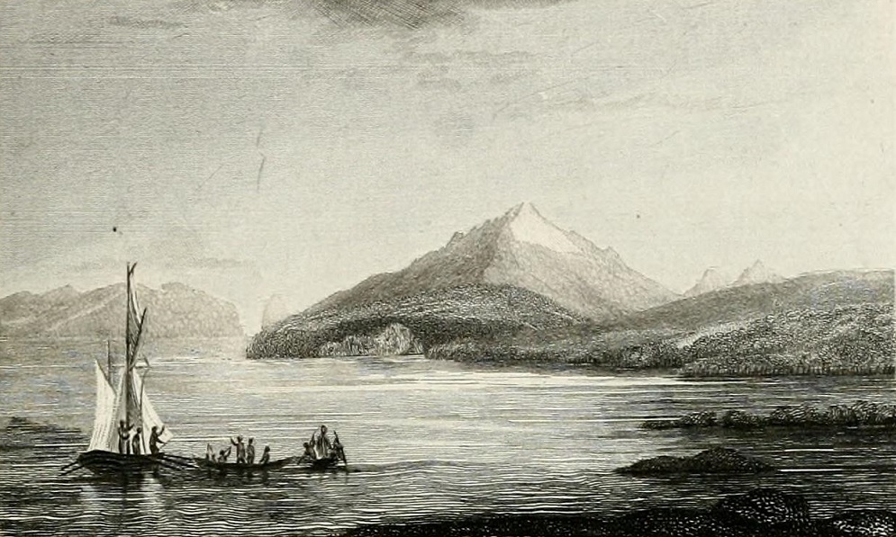 Estrecho de Magallanes 1827 durante la expedición del almirante Phillip Parker King, tomado del libro "Narrative of the surveying voyages of His Majesty's Ships Adventure and Beagle between the years 1826 and 1836, describing their examination of the southern shores of South America, and the Beagle's circumnavigation of the globe. Proceedings of the first expedition, 1826-30, under the command of Captain P. Parker King, R.N., F.R.S. London: Henry Colburn"